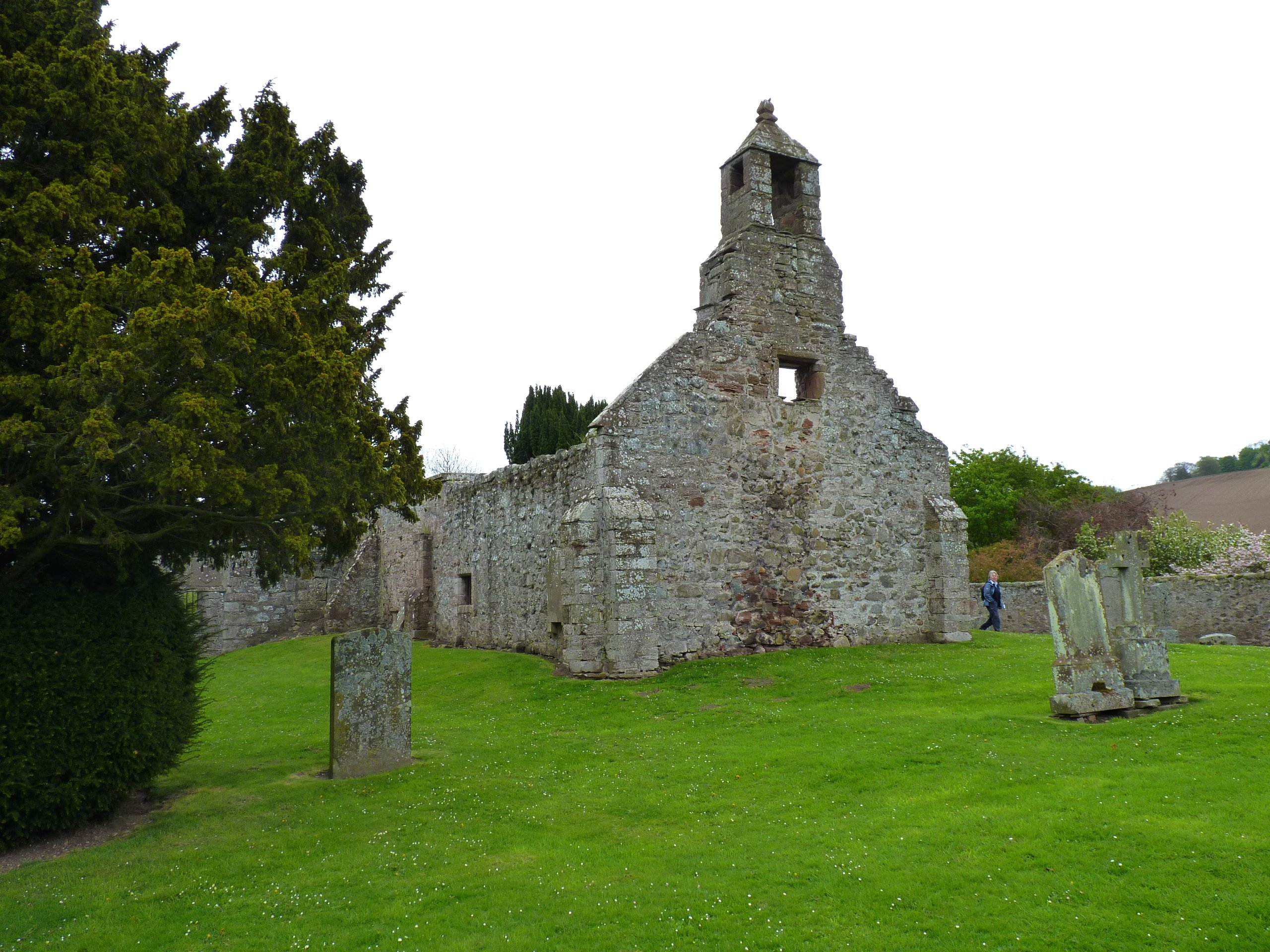 The ruins of the old Abdie parish church, near the shore of Lindores Loch.